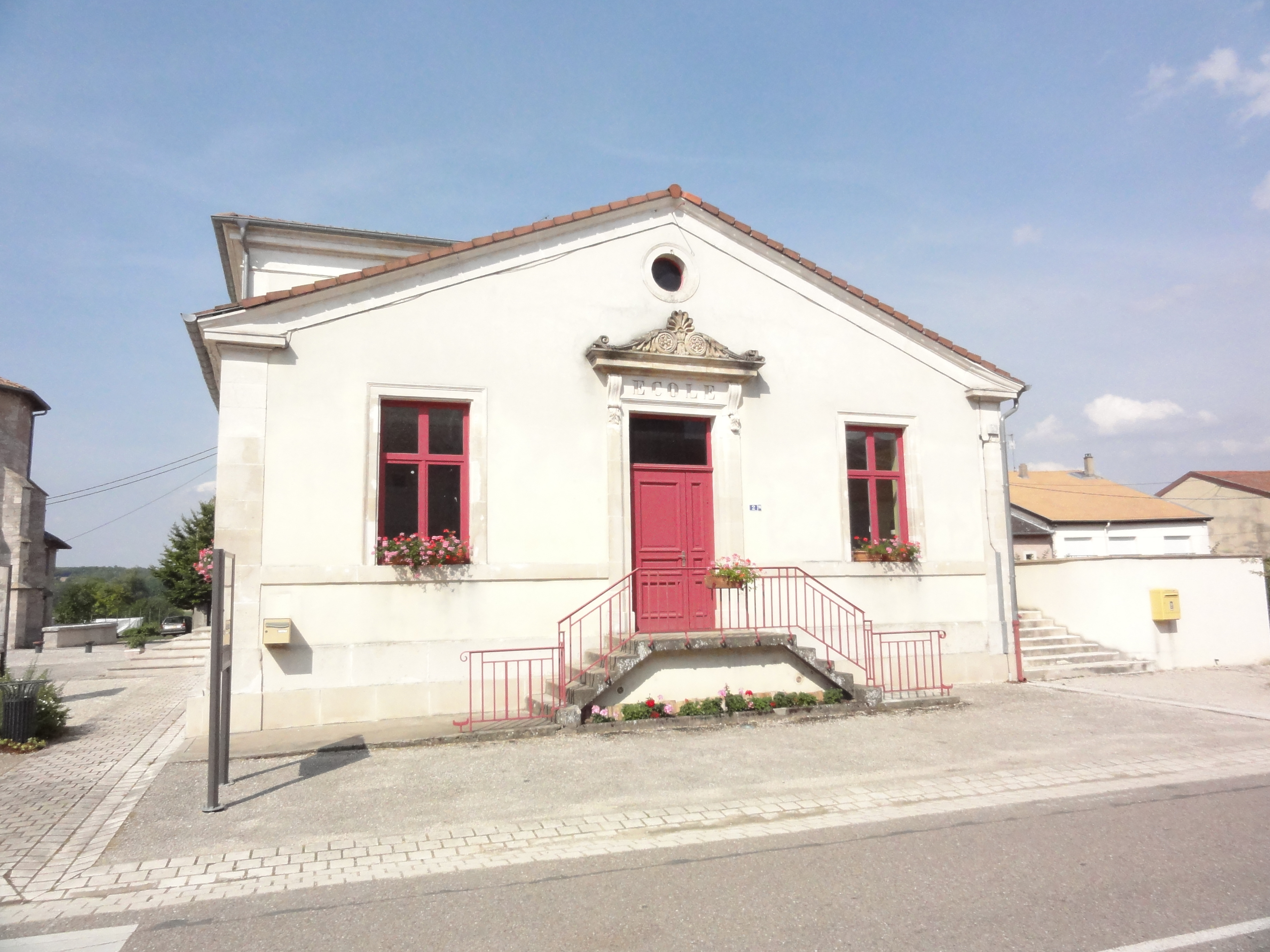 Troussey (Meuse) école